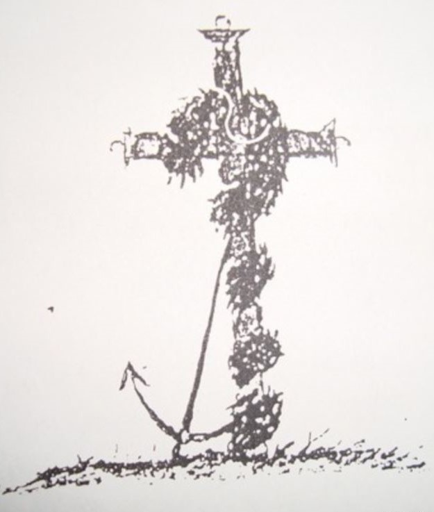 Малюнак Тамаша Грыневіча